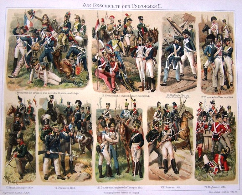 Военная форма: 1.Армии революционной Франции, 2.Армии Наполеона I, 3.Британского королевского ВМФ (конец XVIII в.), 4.Прусской армии 1806 г., 5.Армии Брауншвейга 1809 г., 6.Армия Пруссии 1813 г., 7.Австро-Венгерская армия 1813 г., 8.Русская армия 1813 г.,9. Армия Великобритании 1815 г.